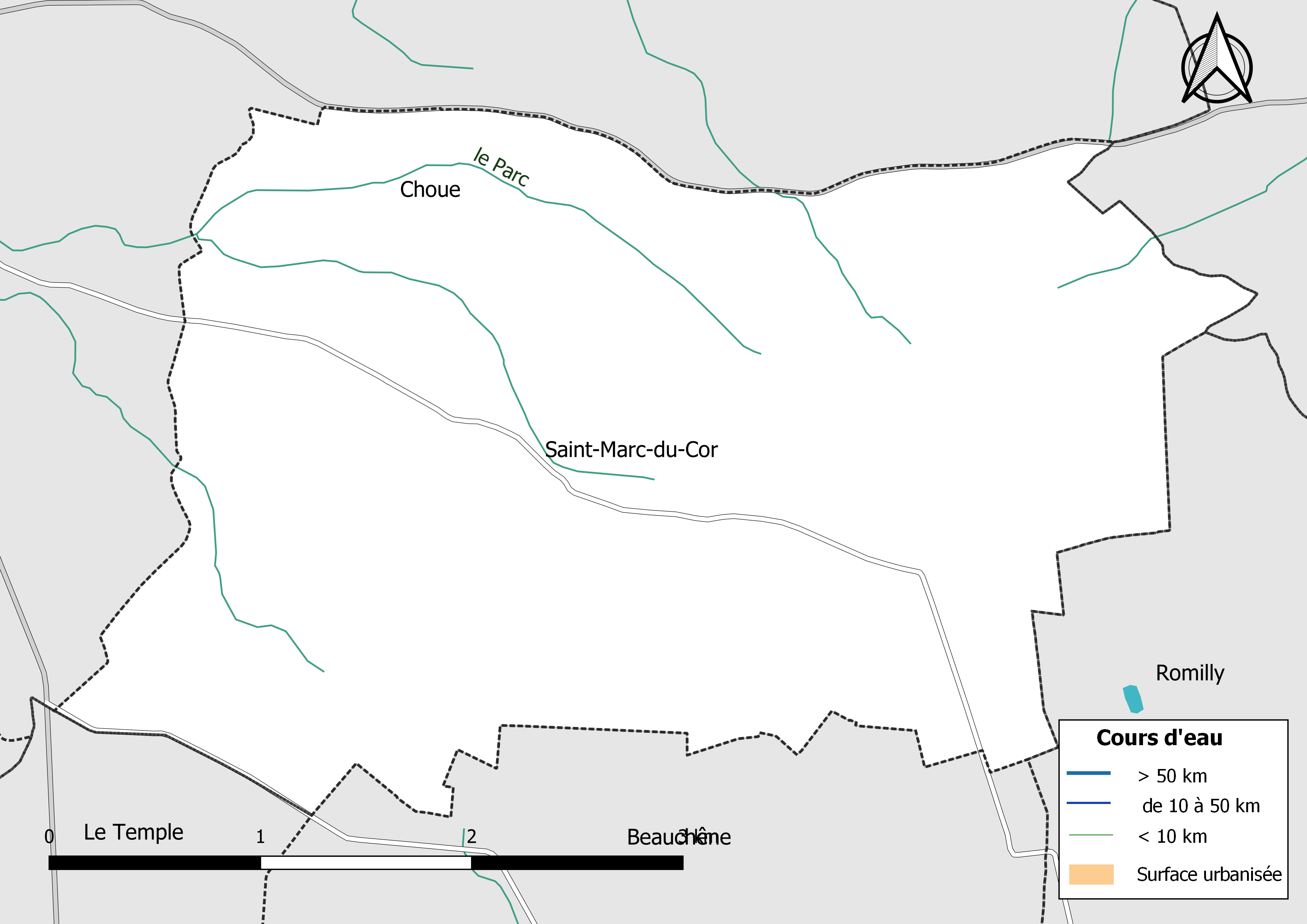 Carte du réseau hydrographique de la commune de Saint-Marc-du-Cor (Loir-et-Cher, France).